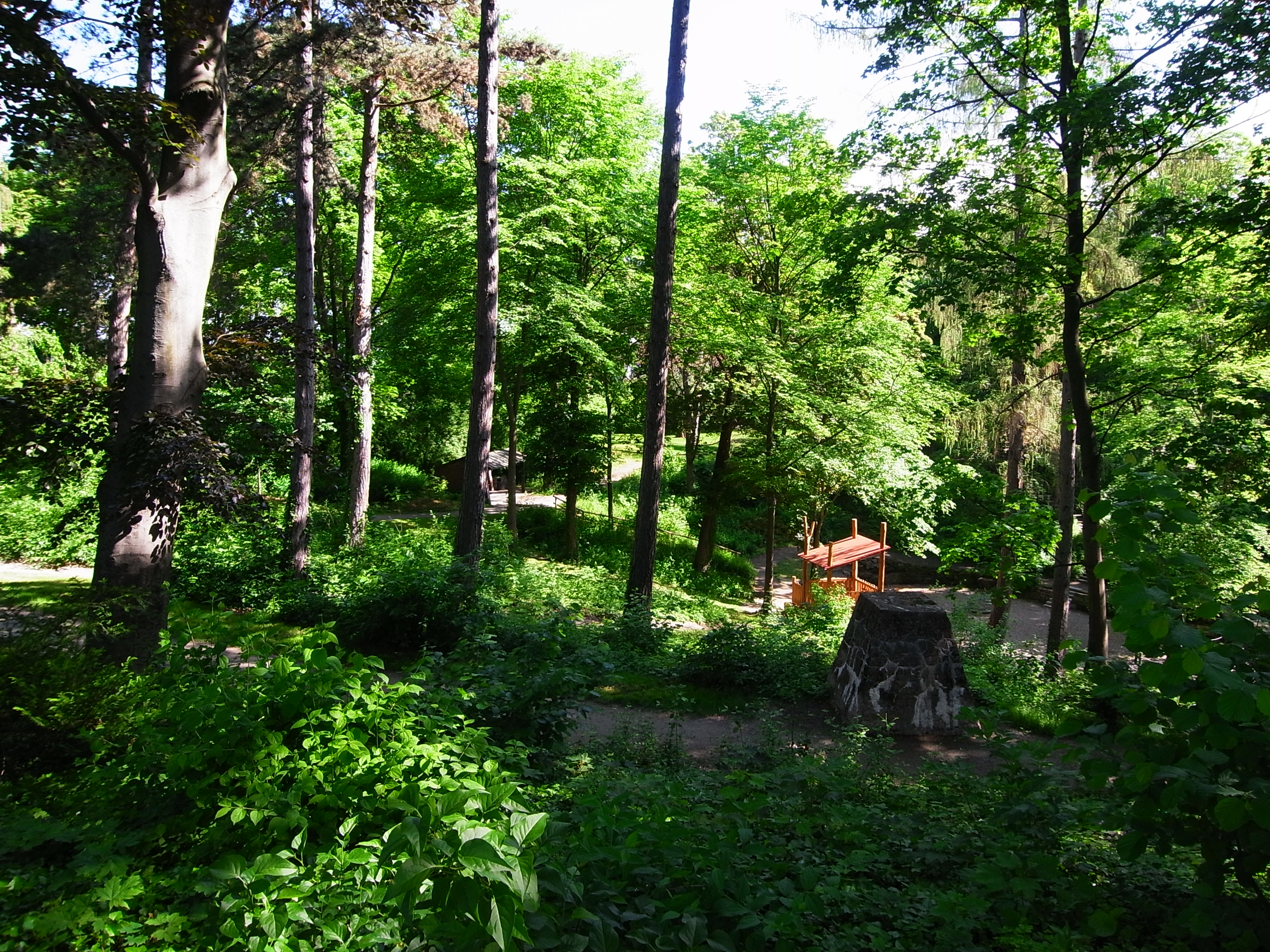 Blick über den Gipfelpark der Karlshöhe